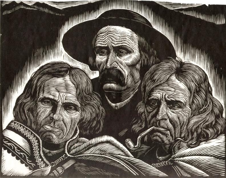 Trzy głowy górali